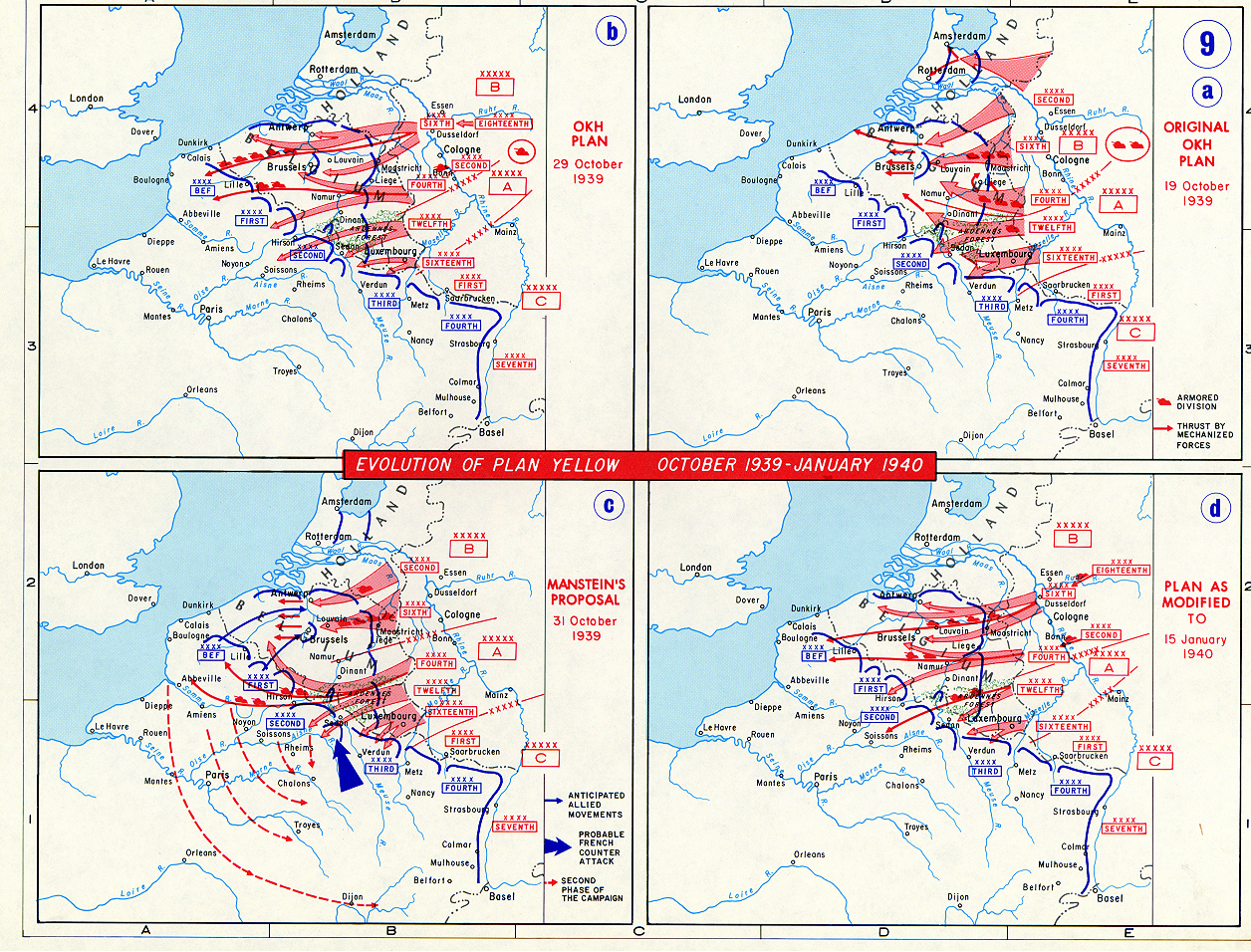 OKH plans